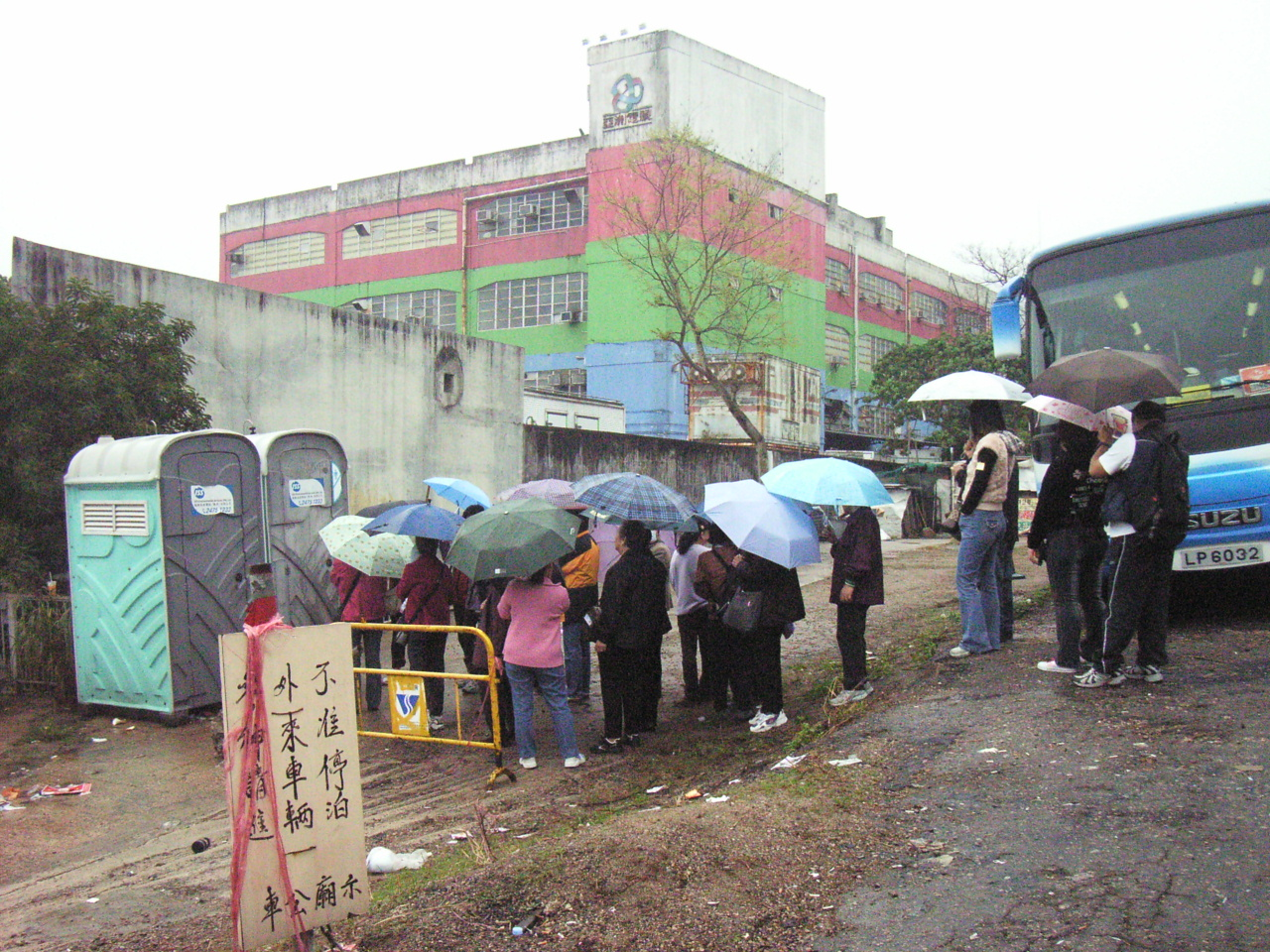 香港西貢區蠔涌亞洲電視錄影廠旁，蠔涌車公廟設置的流動廁所。